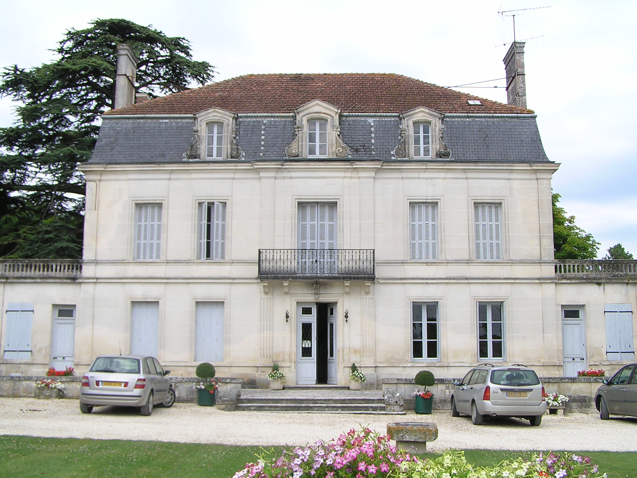 mairie de Genté